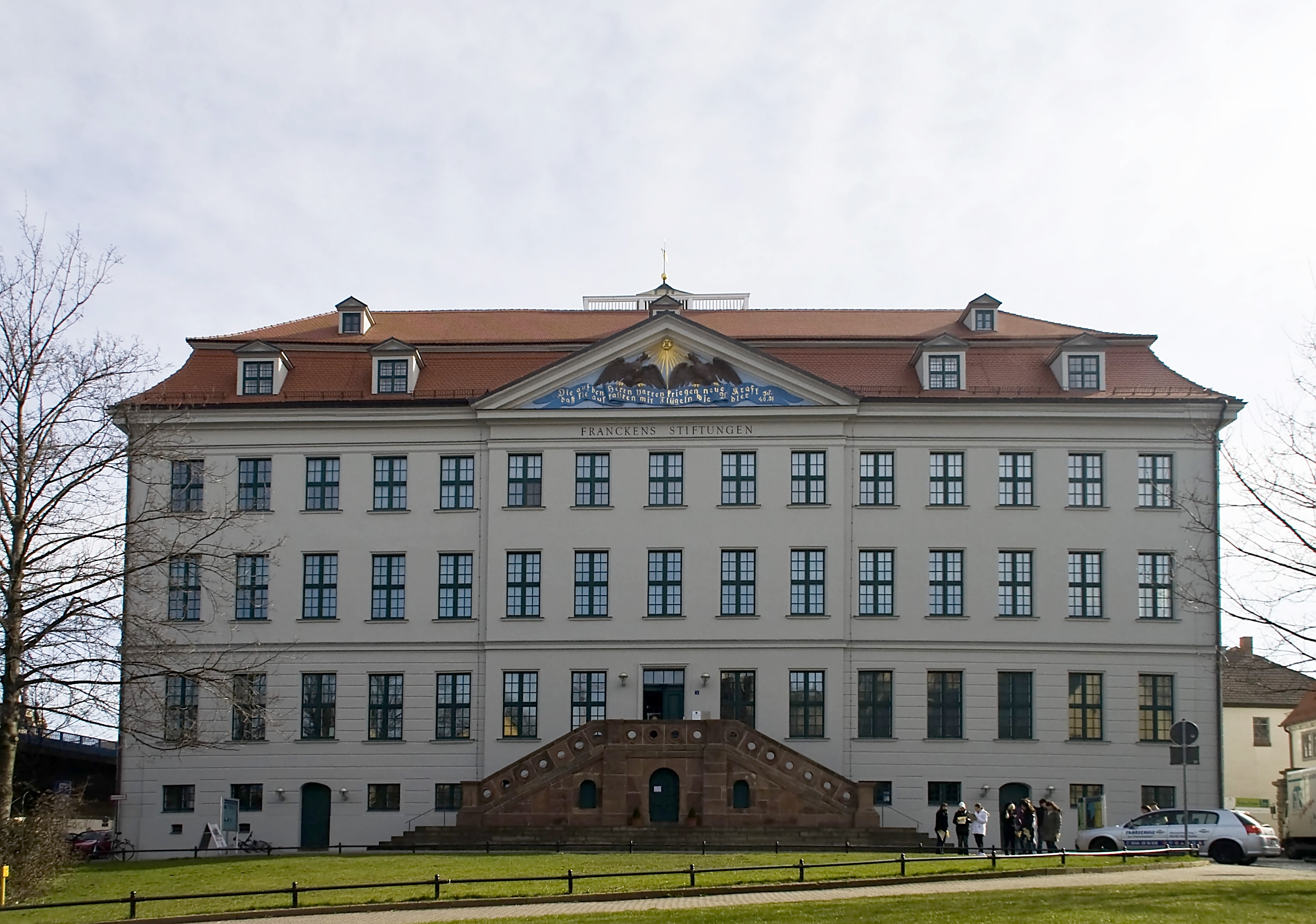 Das Historische Waisenhaus der Franckeschen Stiftungen in Halle/Saale.